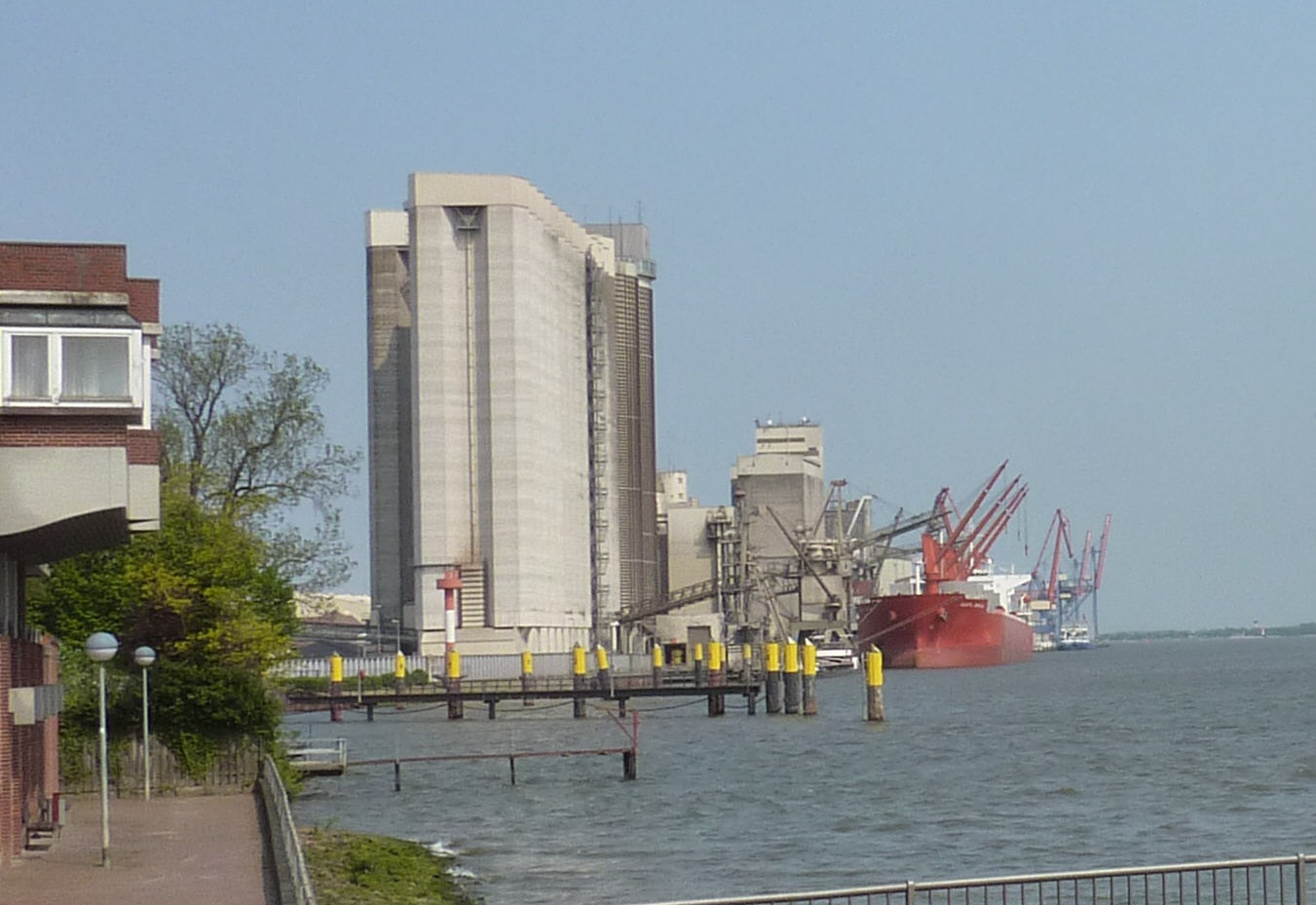 Speicher- und Hafenblick, Brake